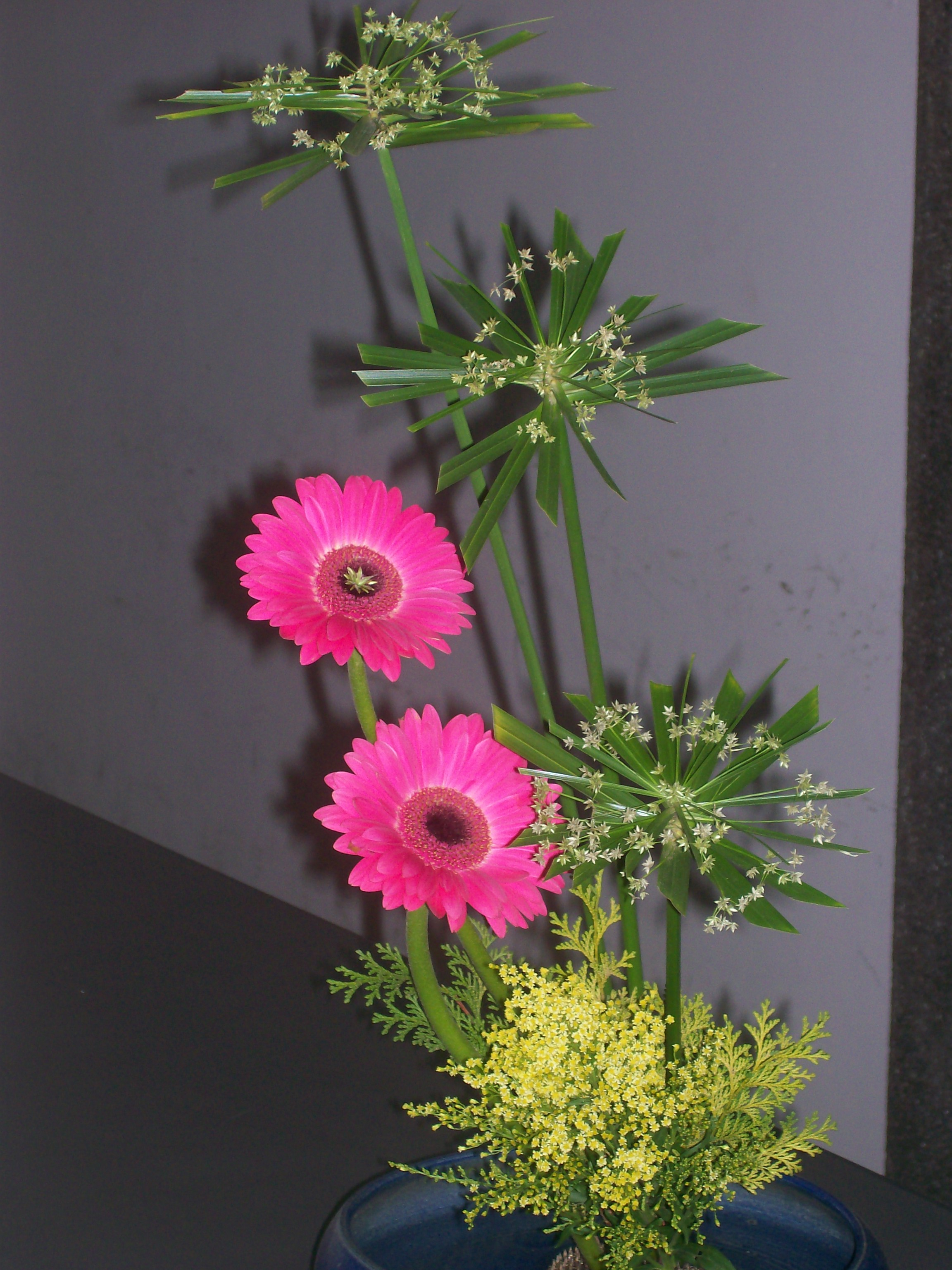 Ikebana Estilo Sanguetsu